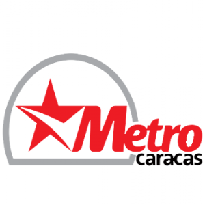 logo del metro de caracas